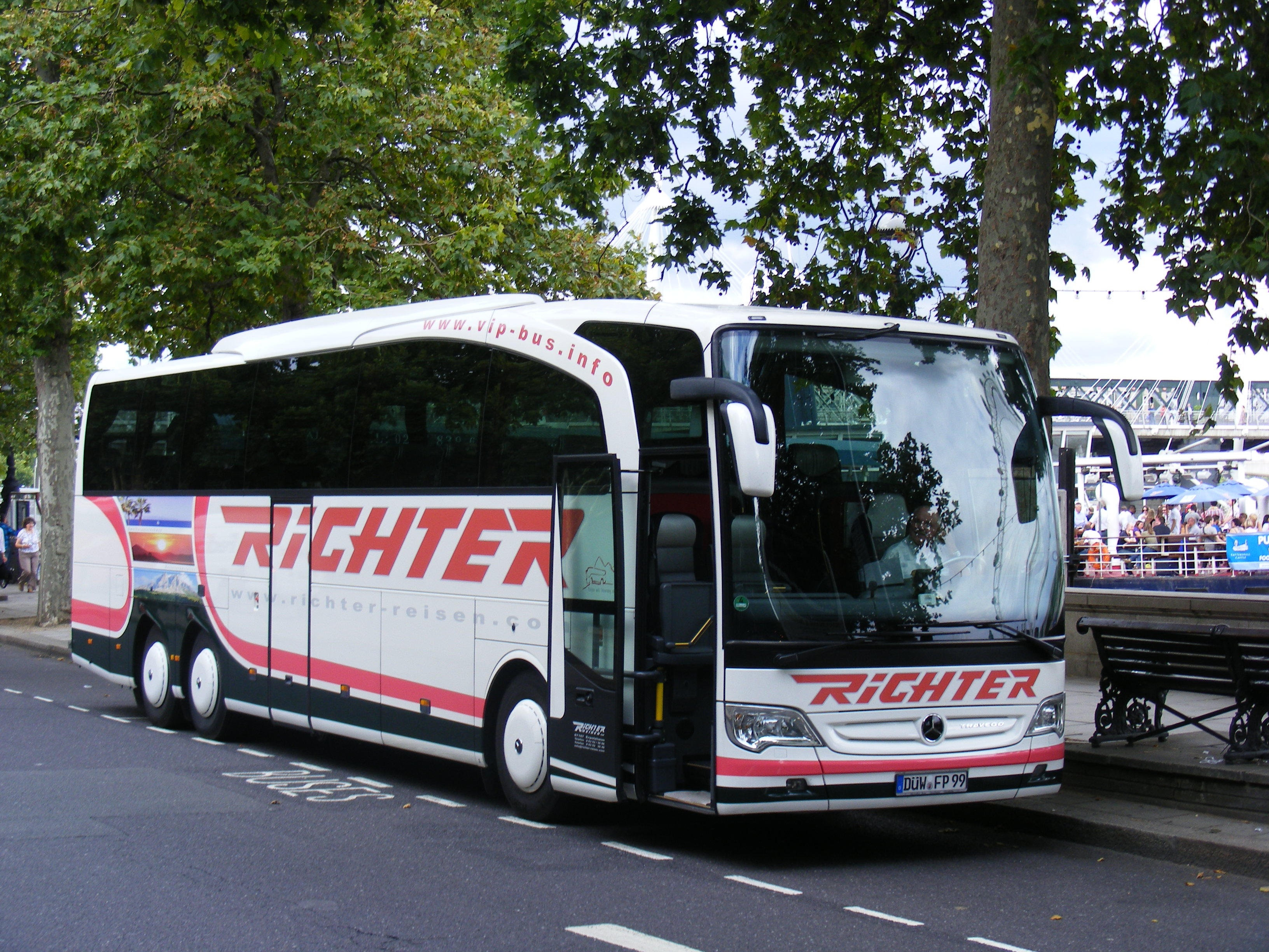 Richter Reisen Erpolzheim DÜW-FP 99, registration for Bad Dürkheim Mercedes-Benz O580 Travego M Richter Reisen GmbH Guthmannshausener Str. 6 D- 67167 Erpolzheim Owners- Horst Richter and Patrick Frühauf Family concern, founded in the 1960s. Photographic gallery from the website here